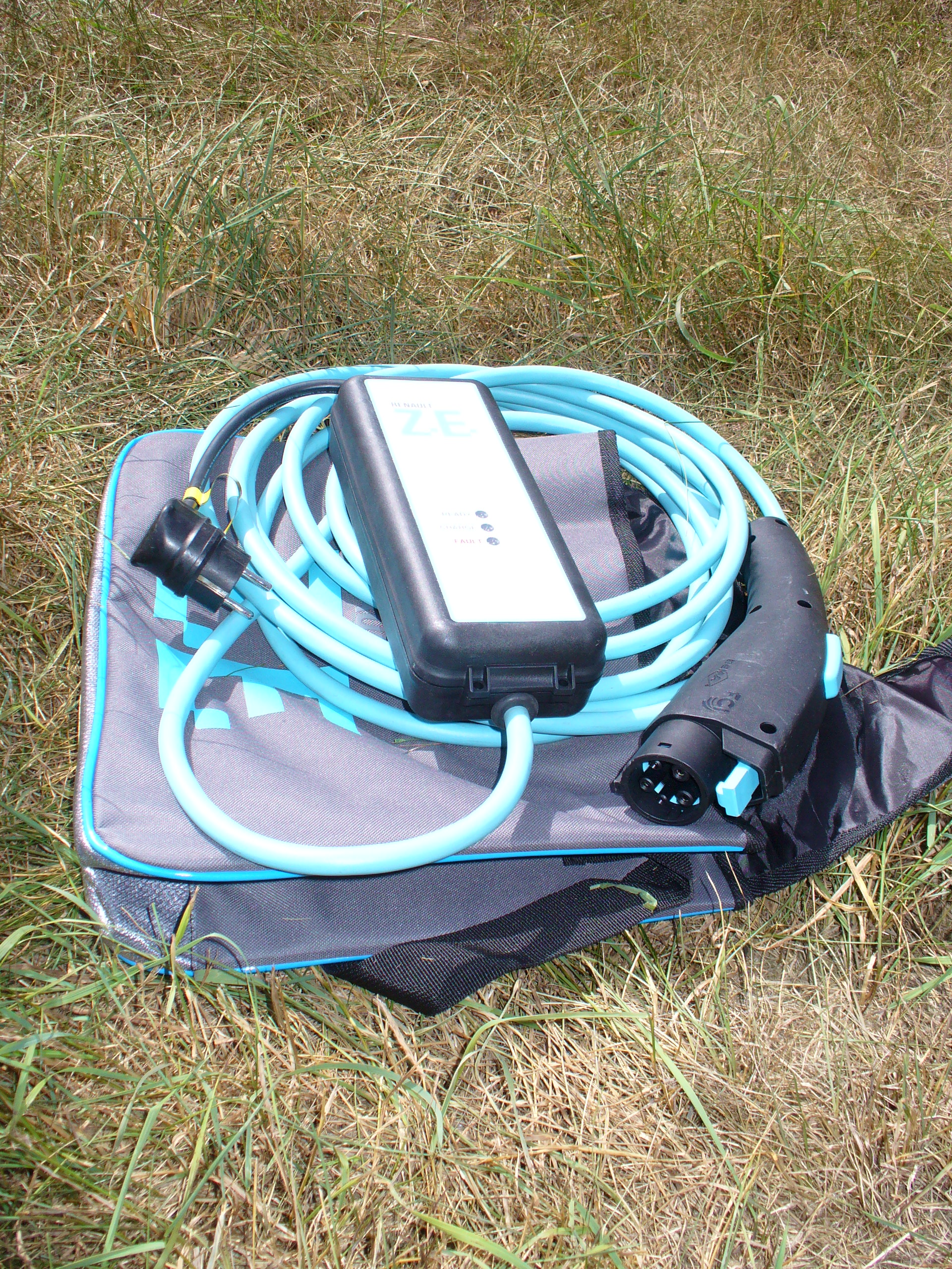 Renault Fluence Z.E., Ansicht Ladekabel für 230V Schukoanschluss